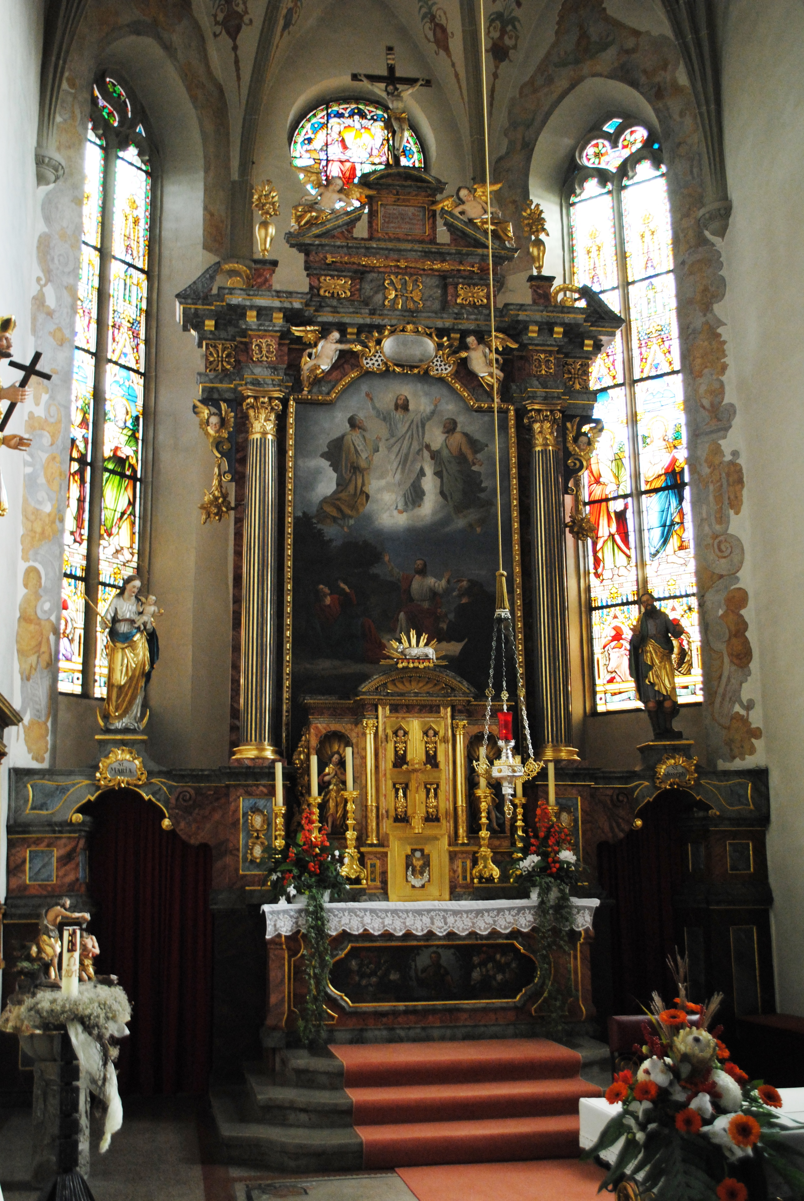 Hochaltar, St. Jakobus Großlangheim